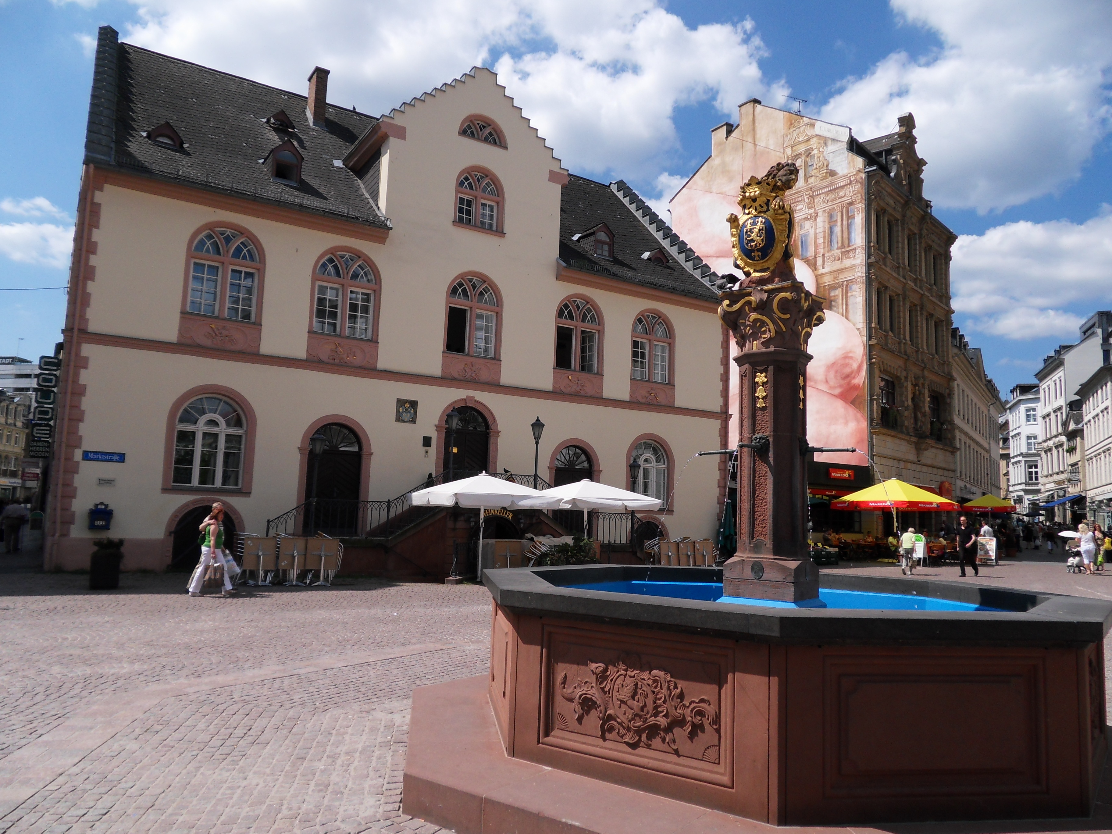 Blick aus Südosten auf den Marktbrunnen von 1753 vor dem Alten Rathaus von 1610